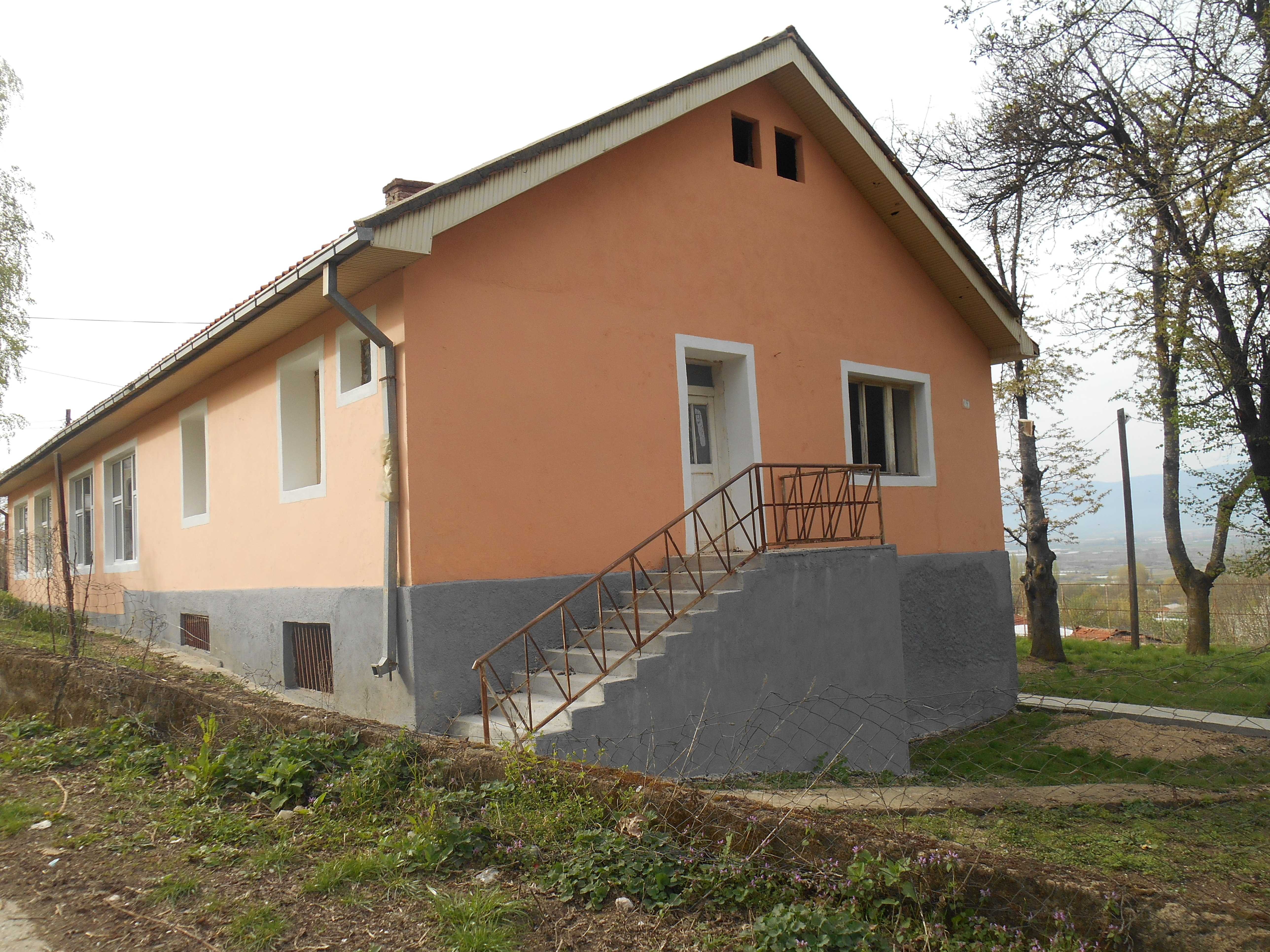 Црквата Свети Илија